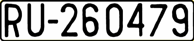 Украинский автомобильный номер времён фашистской оккупации, 1942-1945 года